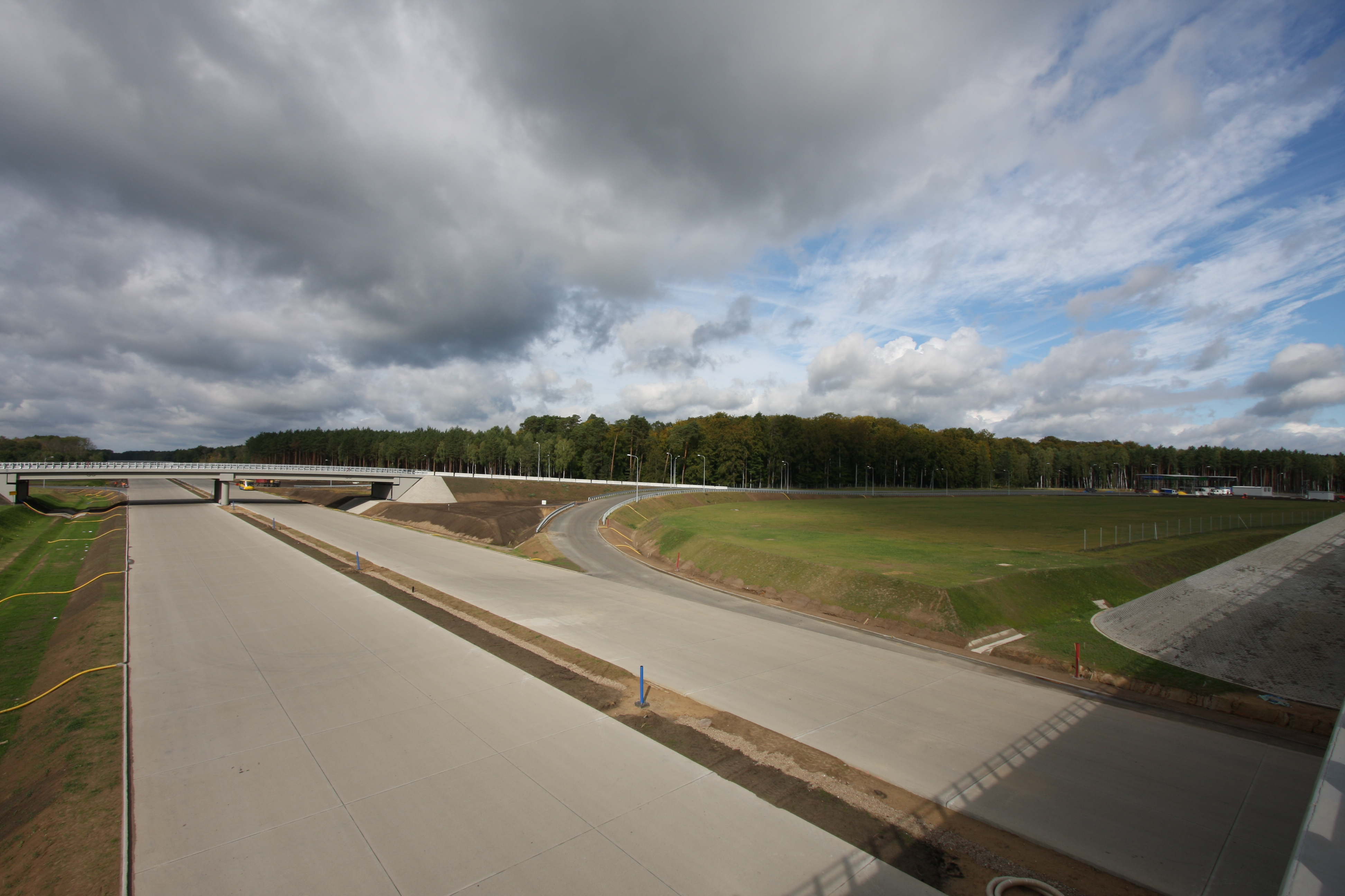 Budowa autostrady A2 - węzeł Trzciel